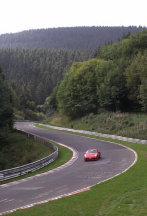 Nürburgring, Section "Adenauer Forst", Eifel, Germany